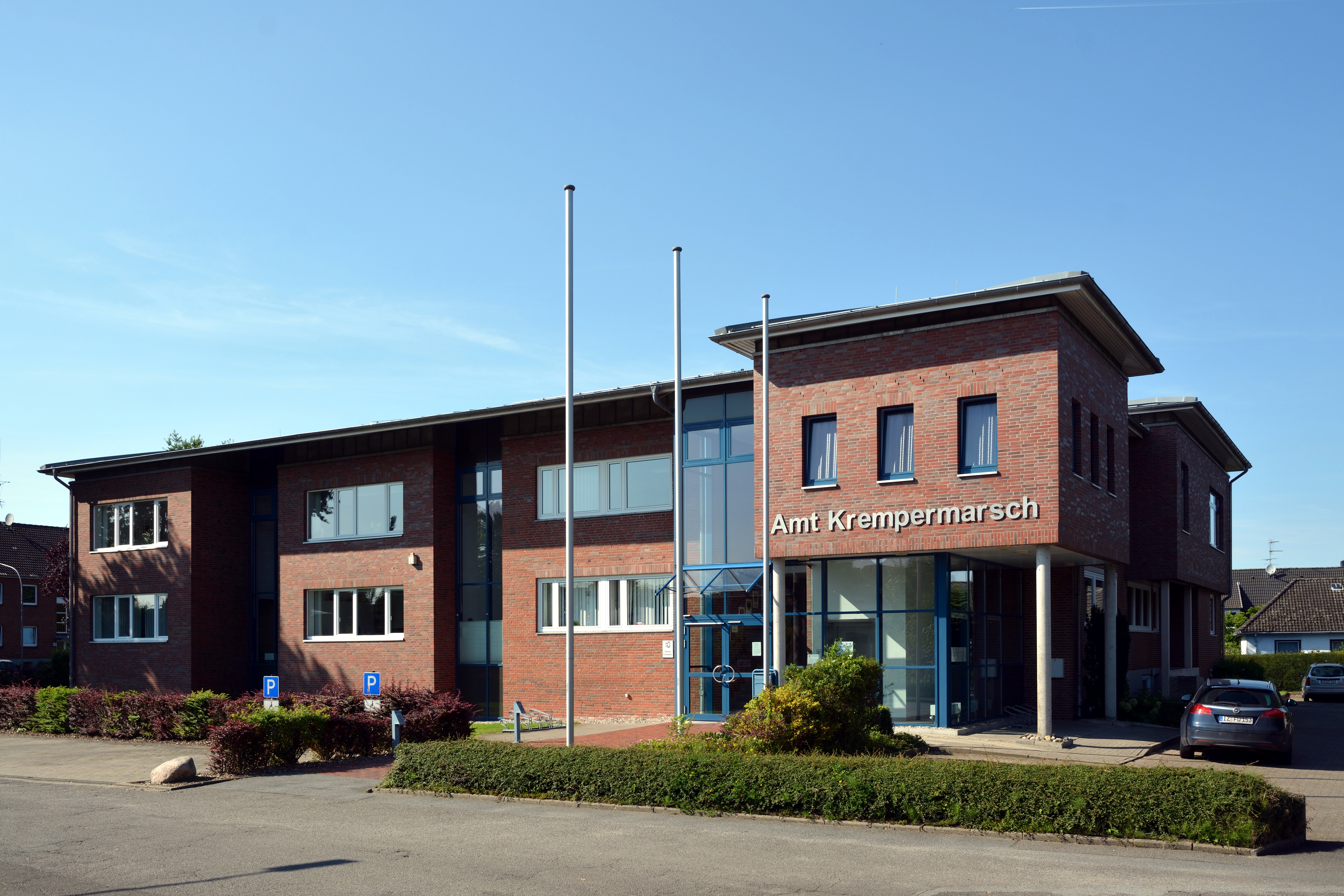 Das Verwaltungsgebäude "Amt Krempermarsch" in Krempe